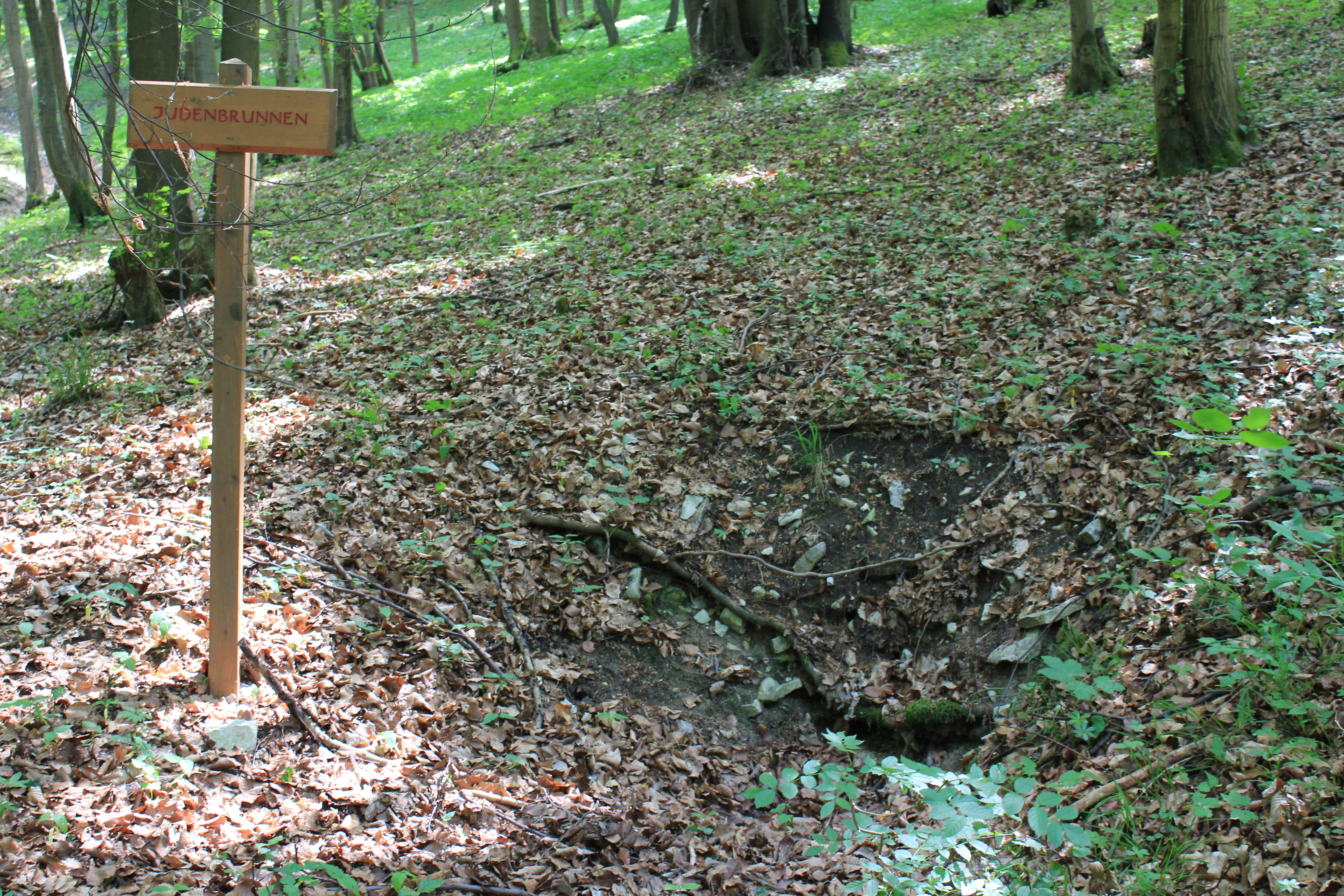 Die Kleine Quelle "Judenbrunnen" am Nordhang des Kordigasts